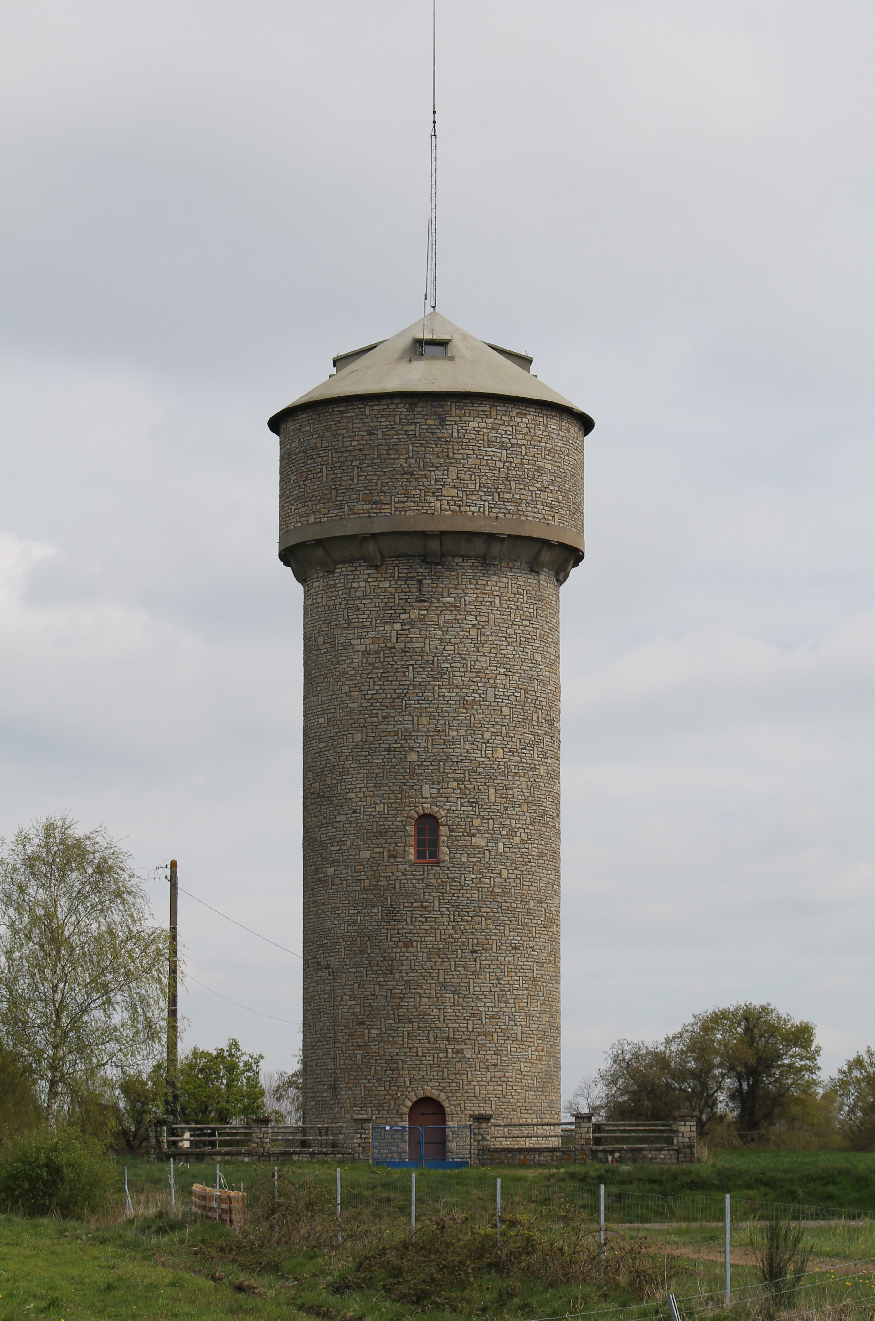 Château d'eau de Malansac (Morbihan). Image légèrement corrigée.